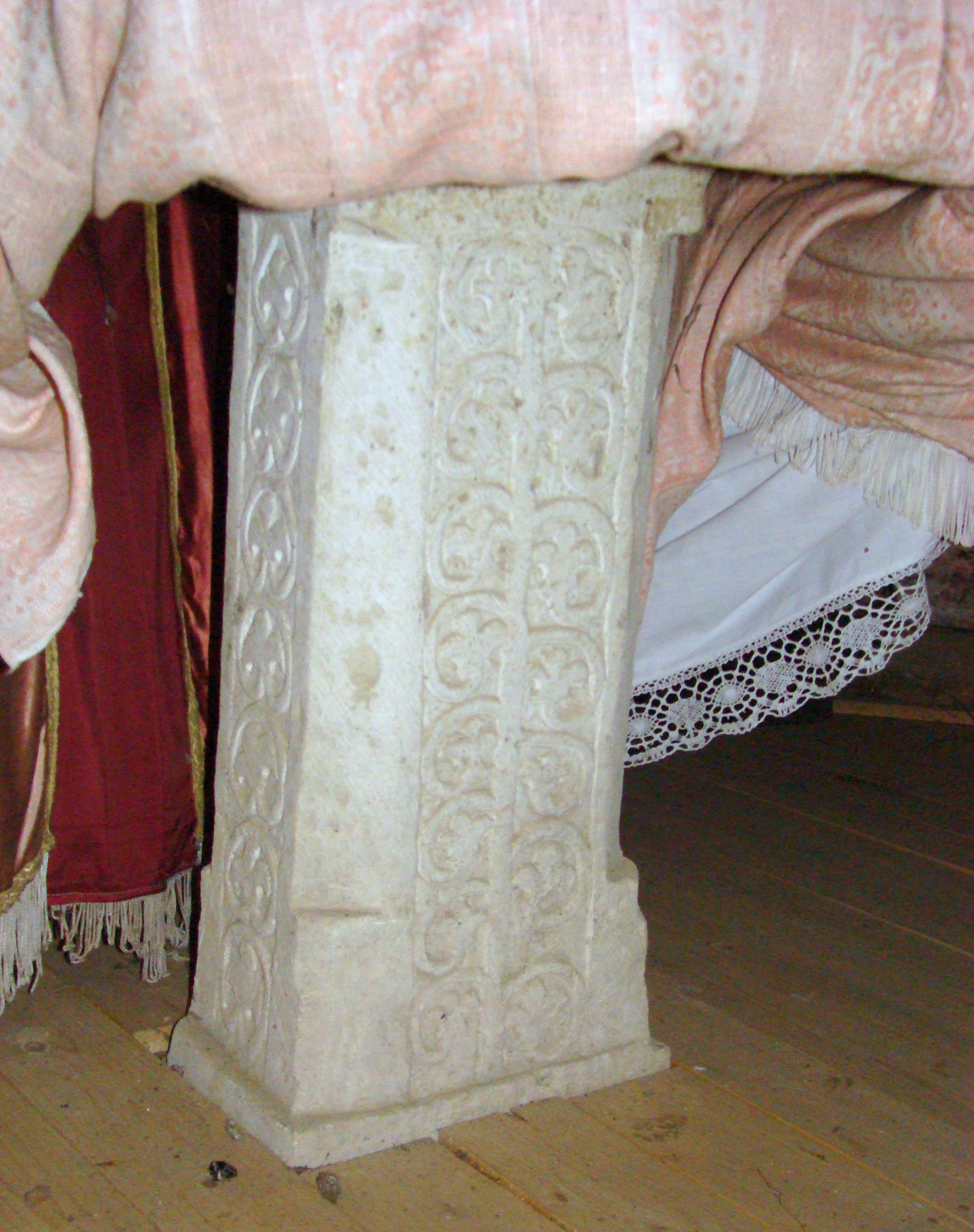 Biserica de lemn „Sfinții Arhangheli” din Berindu, județul Cluj